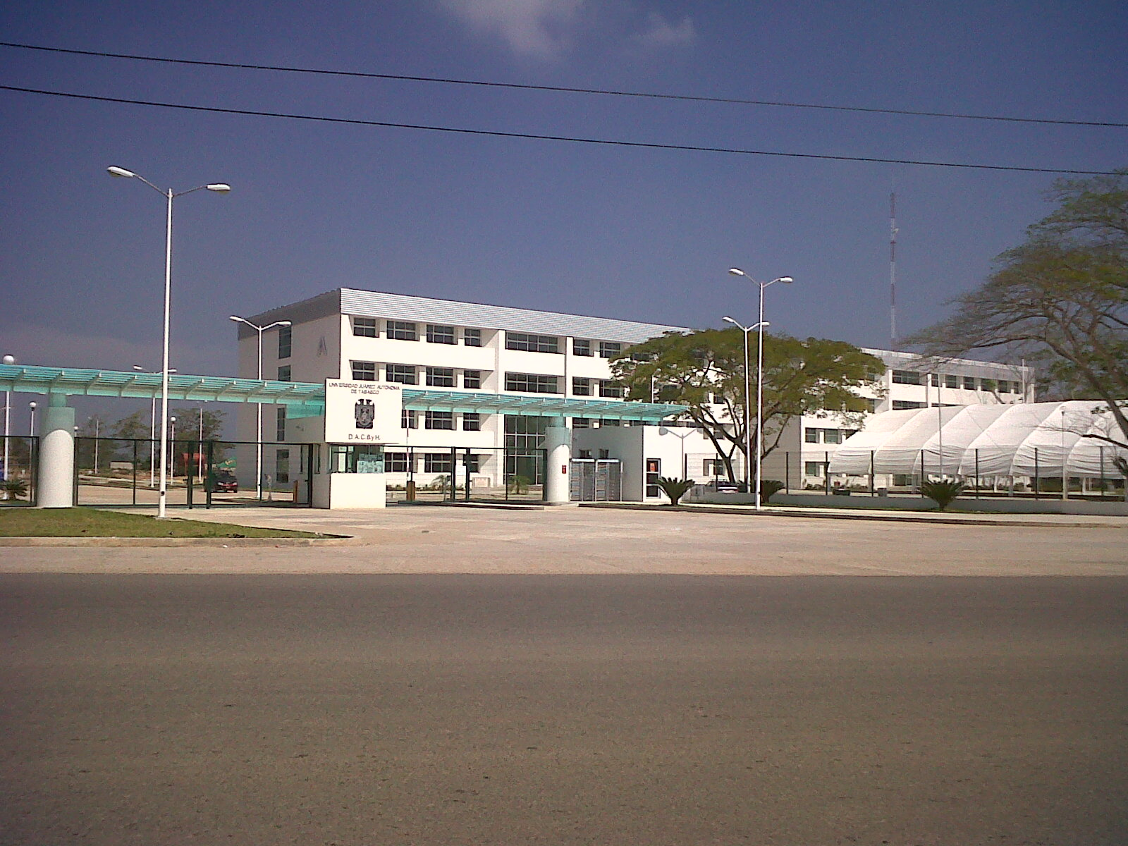 Campus "Bicentenario" de la Universidad Juárez Autónoma de Tabasco, que agrupa a la División Académica de Ciencias Sociales y Humanidades (DACSH), en donde se imparten las licienciaturas de Derecho, Historia y Sociología. Localizada en la ciudad de Villahermosa, estado de Tabasco, México.